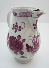 Kaffeekanne der Porzellanfabrik Rauenstein, purpurfarben, um 1830